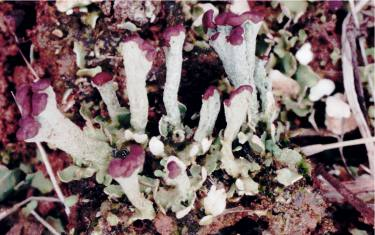 Cladonia subcariosa